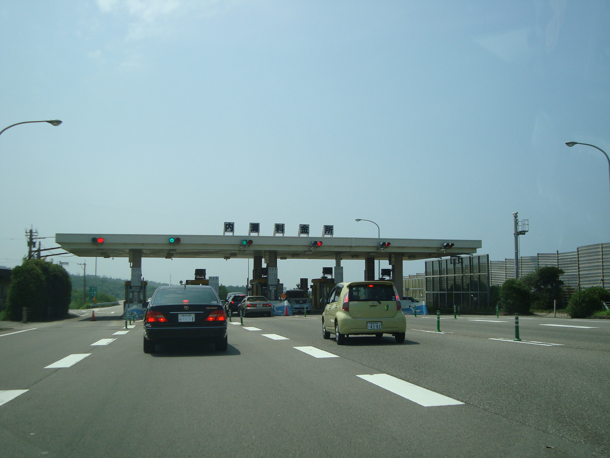 能登有料道路 内灘本線料金所